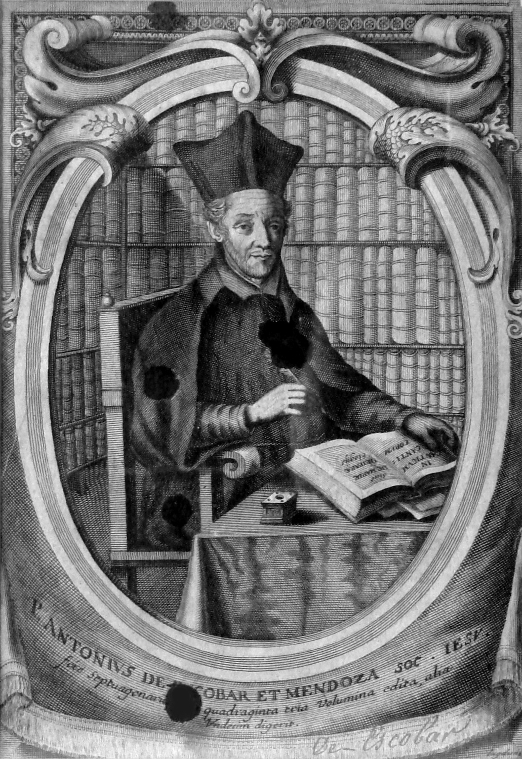 Antoni us de Escobar et Mendoza